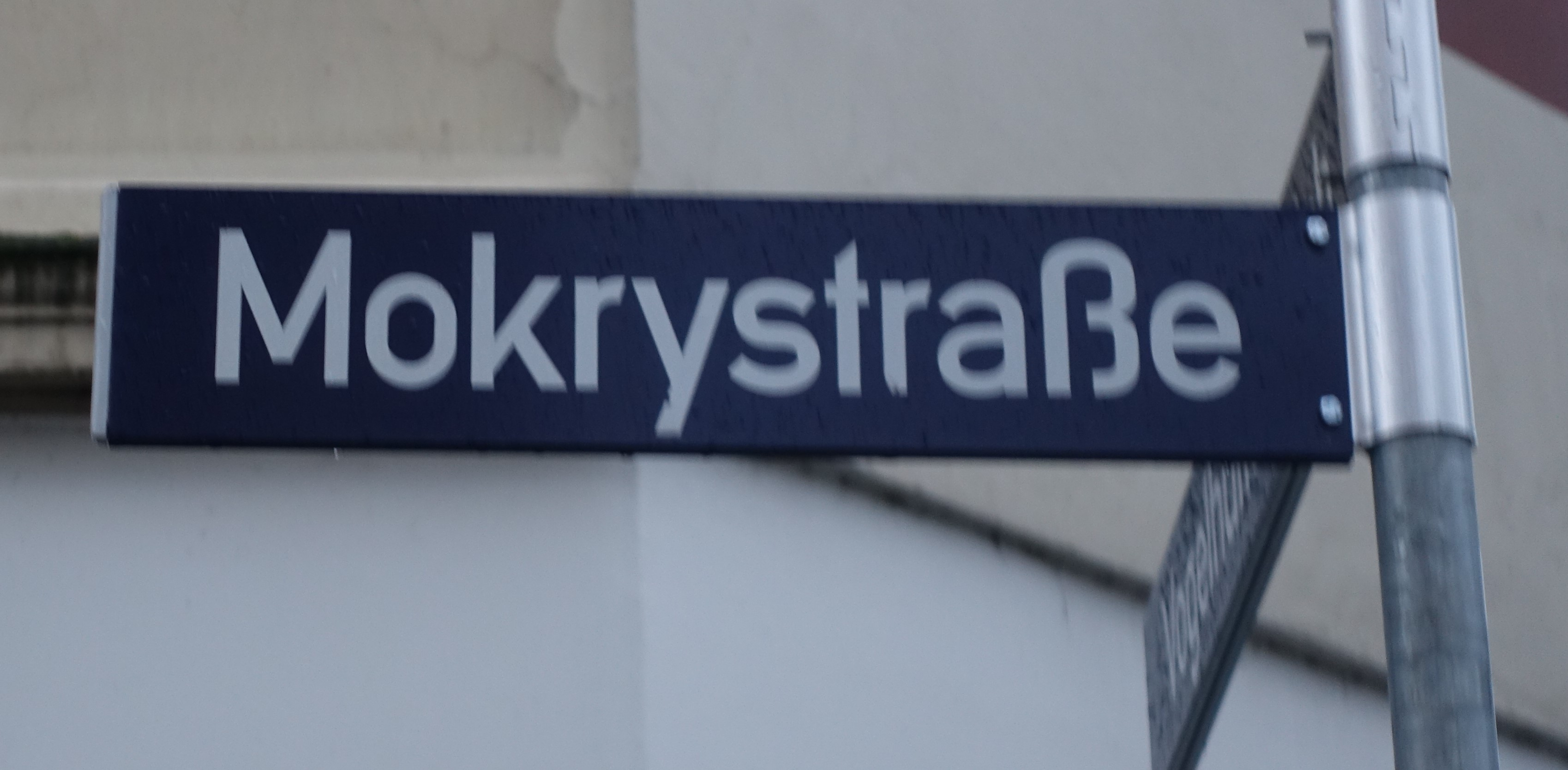 Straßenschild zu Richard Mokry